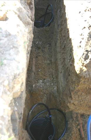 уложенный спиральный коллектора высотой 2 метра